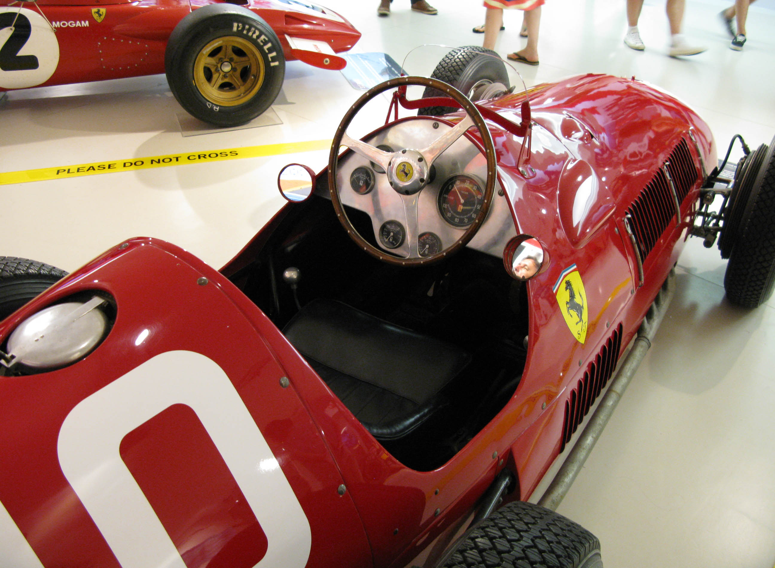 Ferrari 500 F2